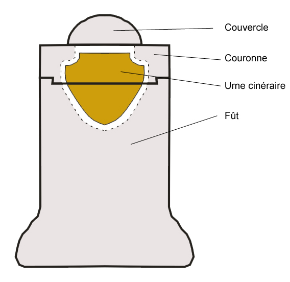 Schéma de synthèse hypothétique d'un ossarium complet.